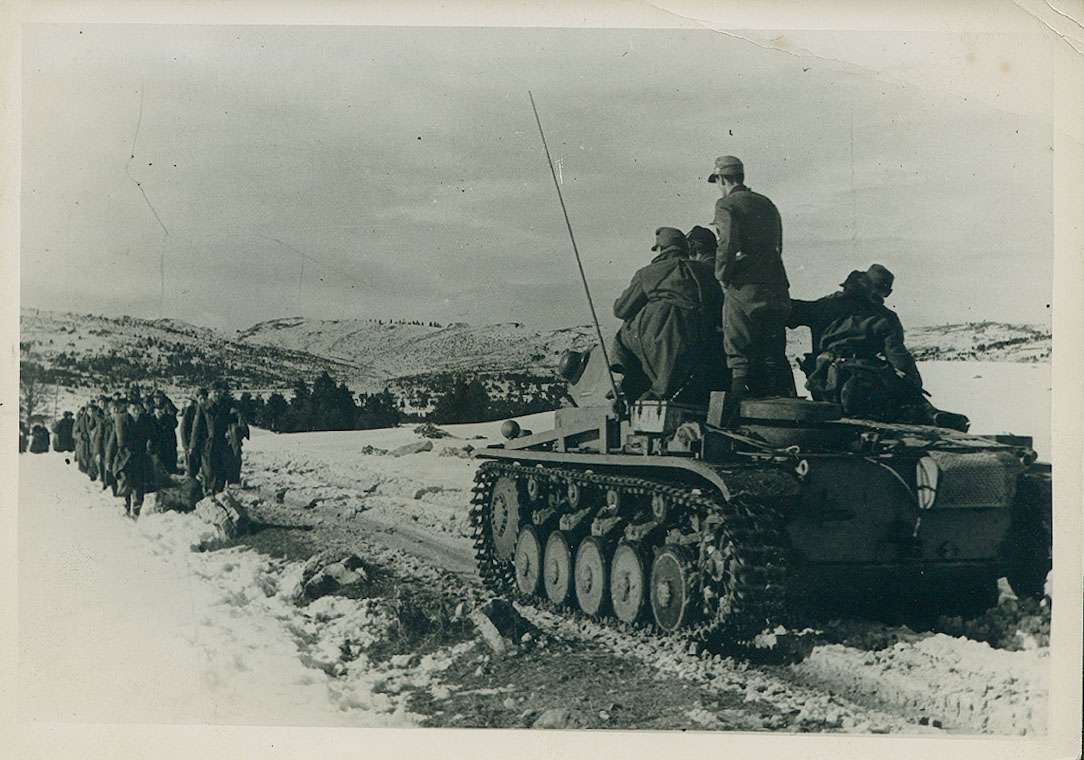 tenk s kolonom domobrana u pozadini